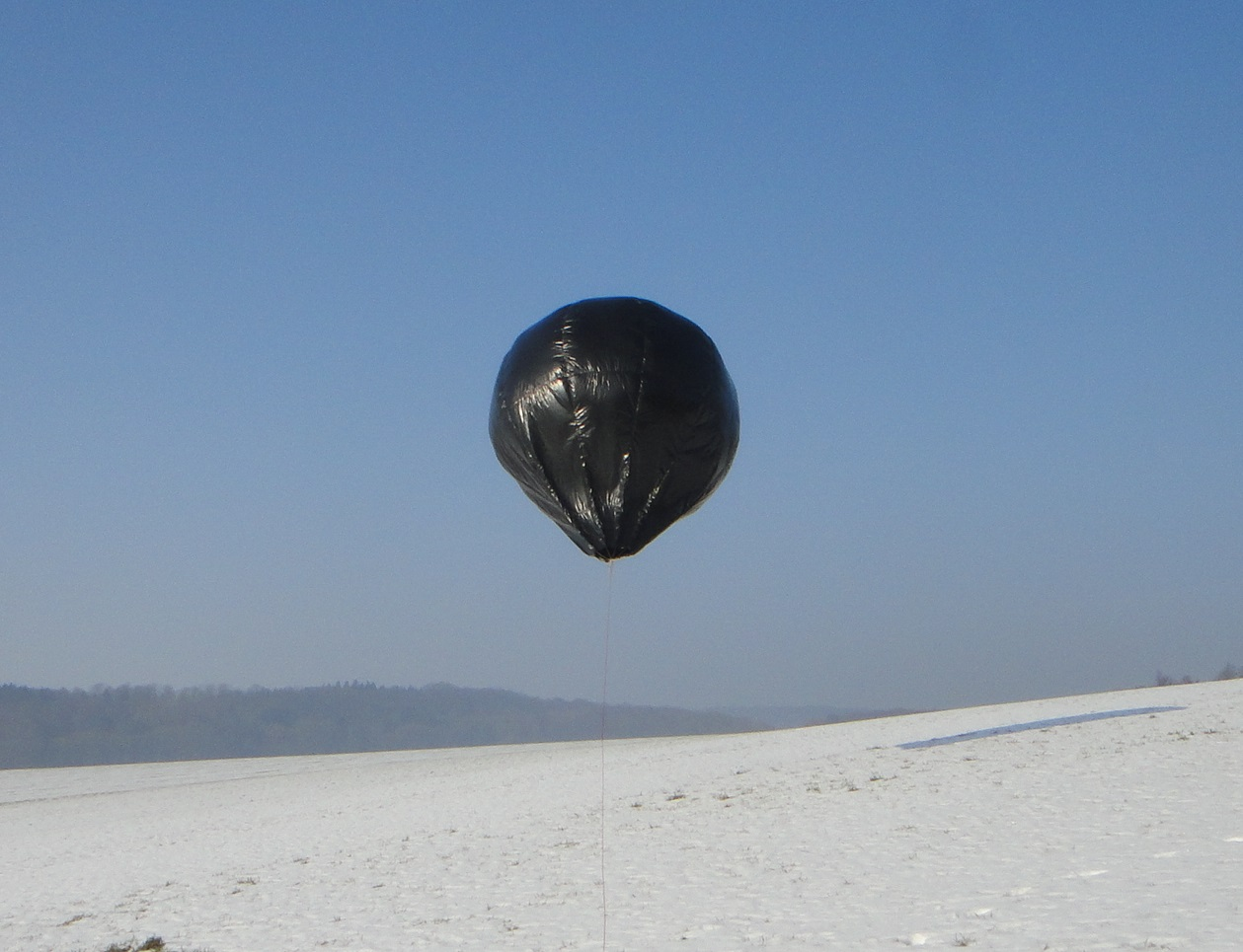 Gefesselter Solarballon Hot 18 im Winter